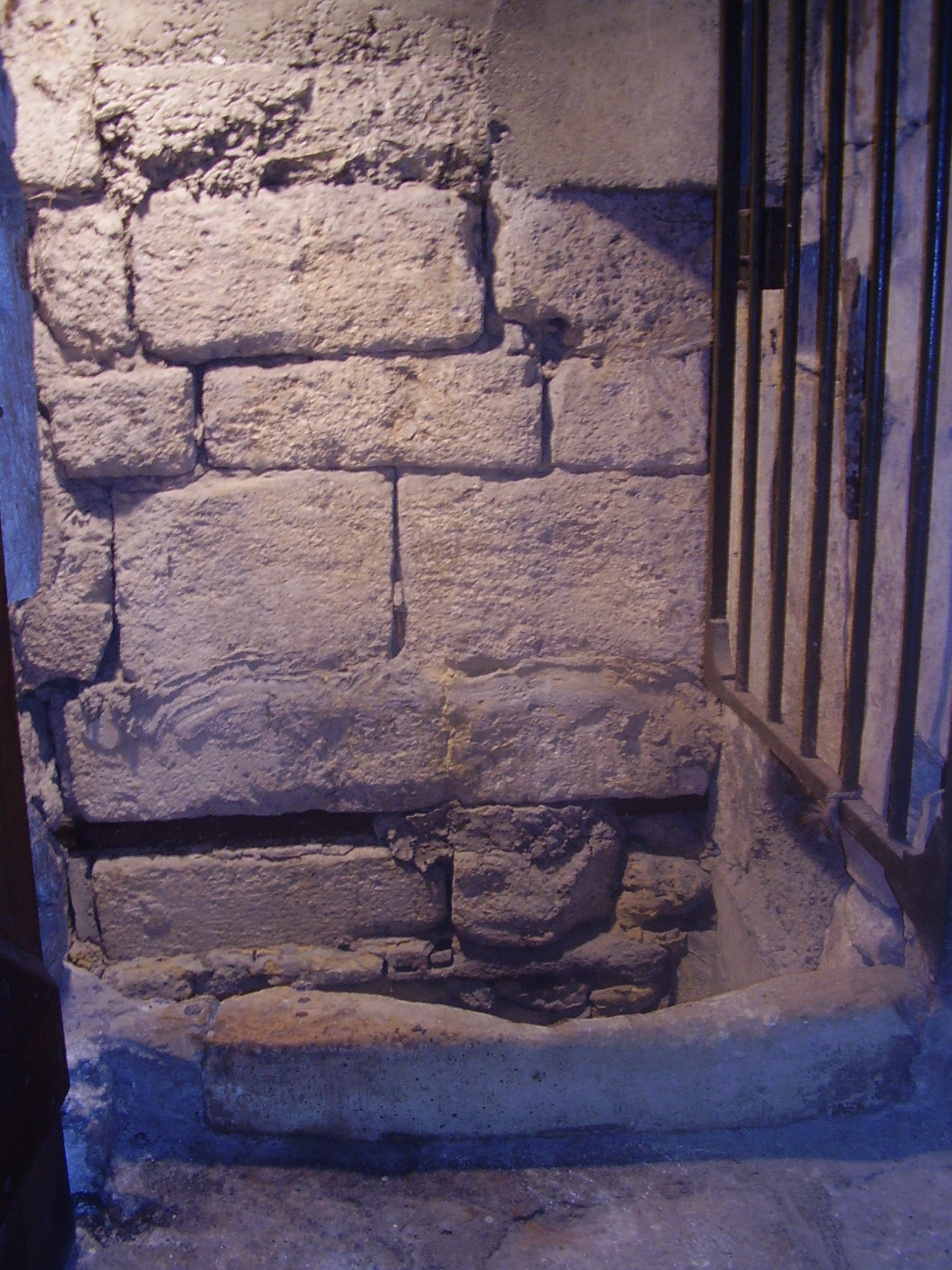 Puits de Saint Roch Montpellier 17-08-2007